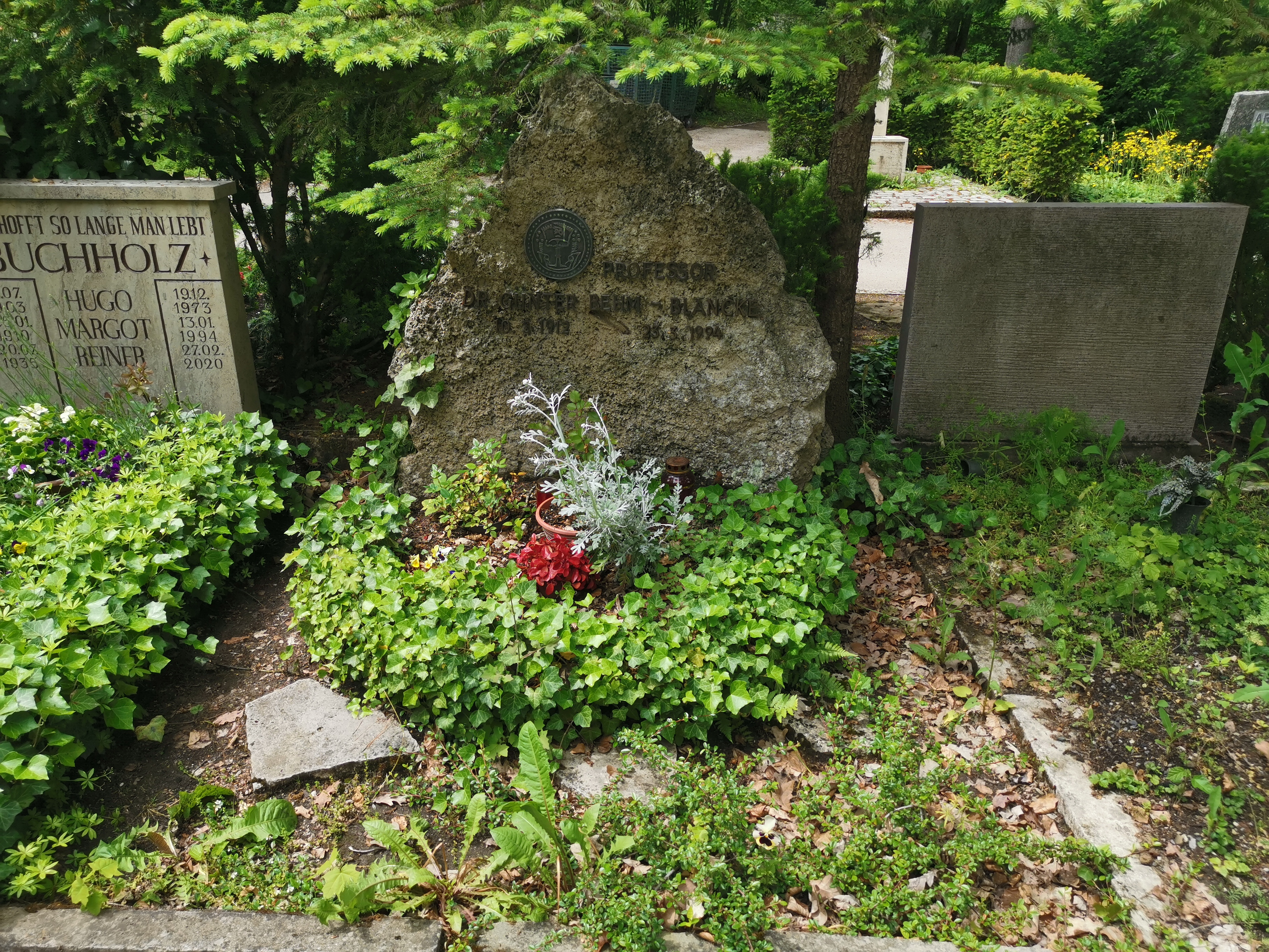 Grabstätte Prof. Günter Behm-Blancke; Historischer Friedhof Weimar